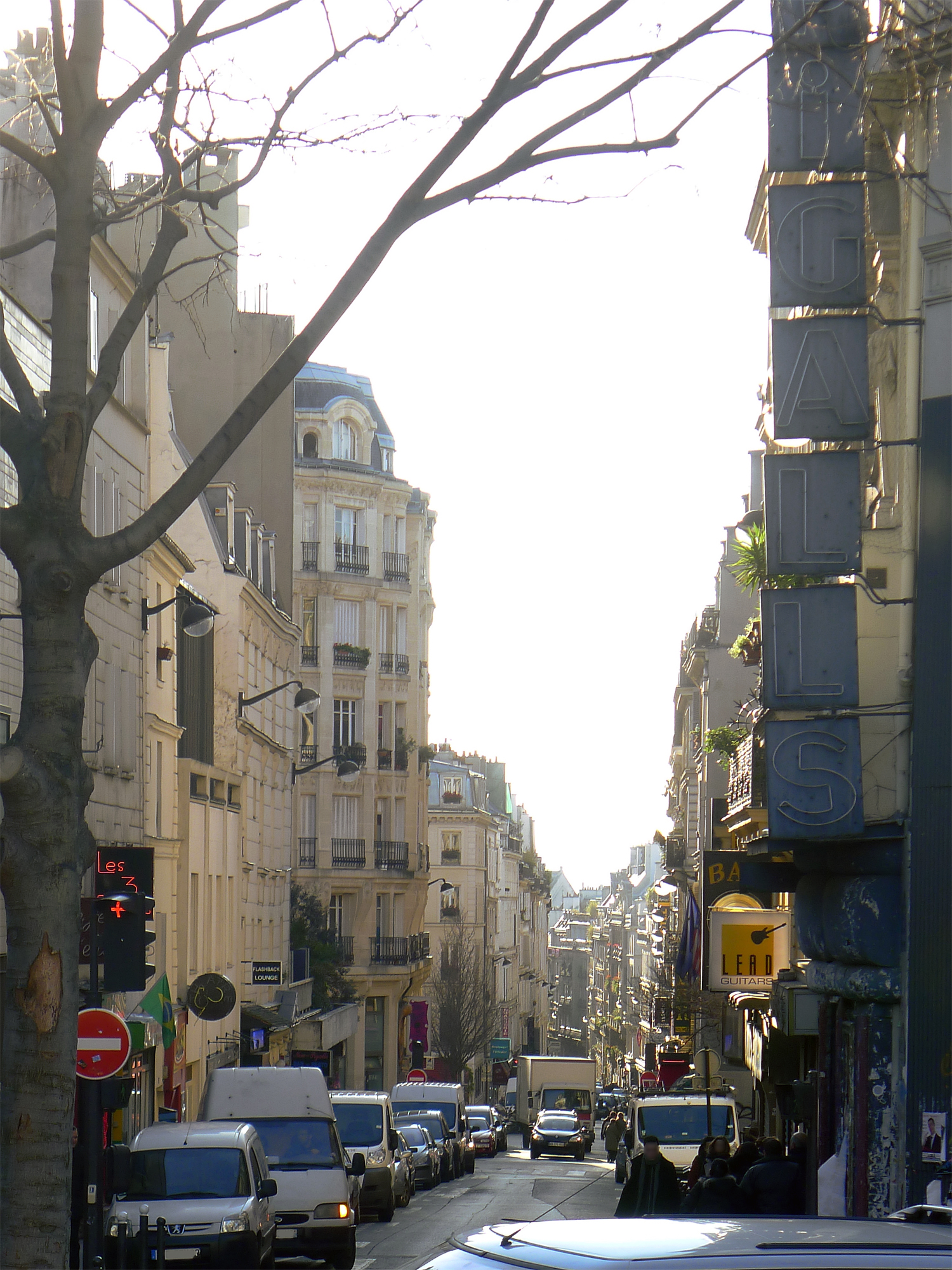 Rue Pigalle - Paris IX